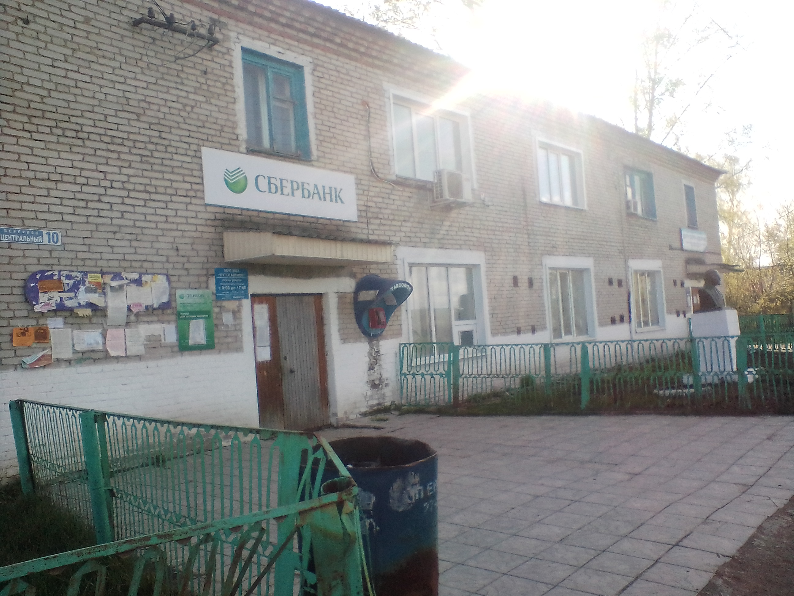 Отделение банка и местный магазин